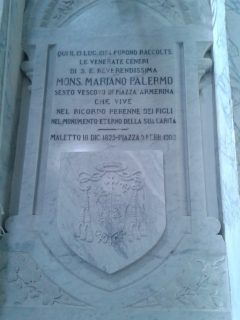 La sepoltura di S.E. Mons. Mariano Palermo